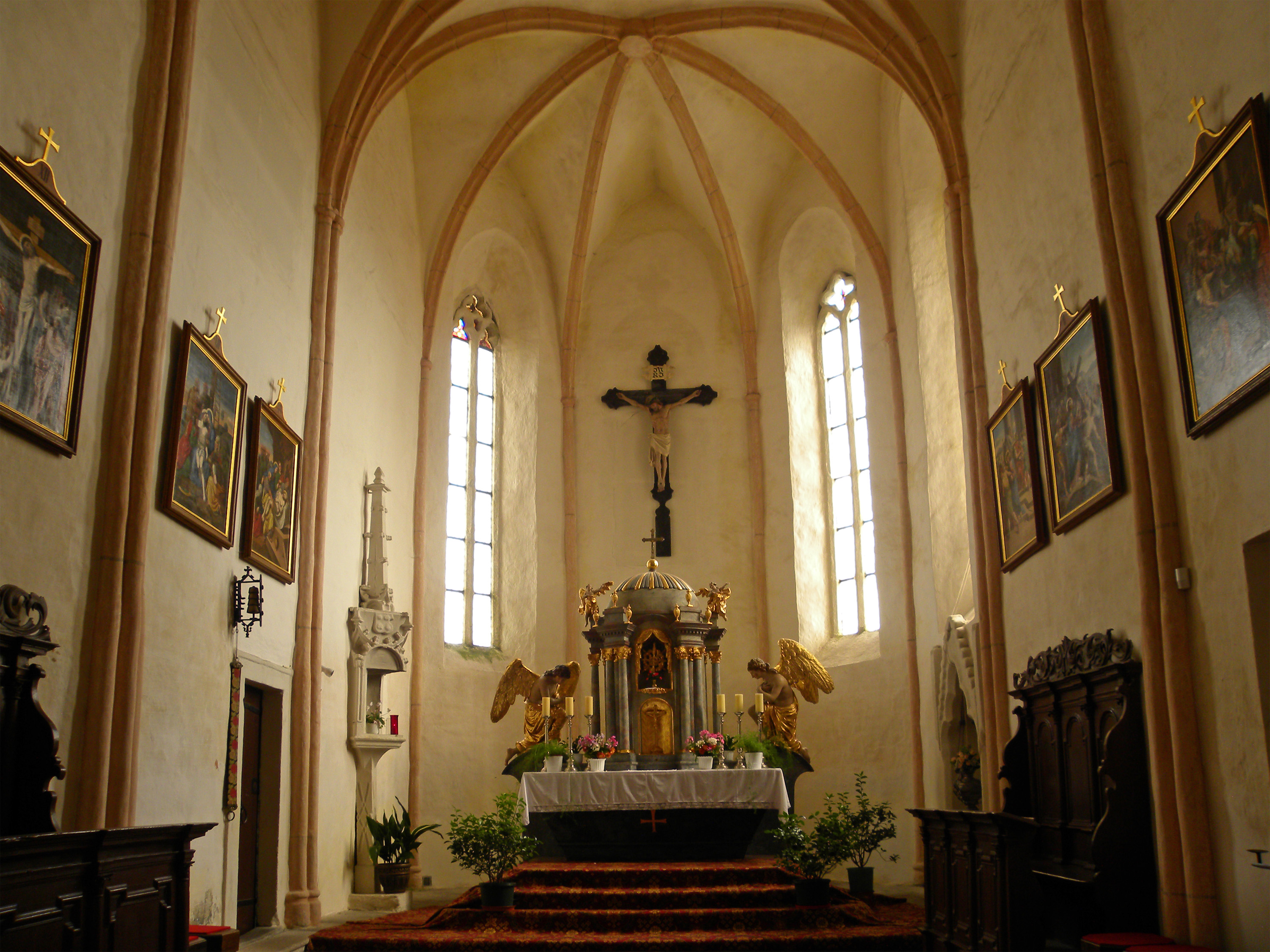 Kath. Pfarrkirche Mariä Geburt und Friedhof